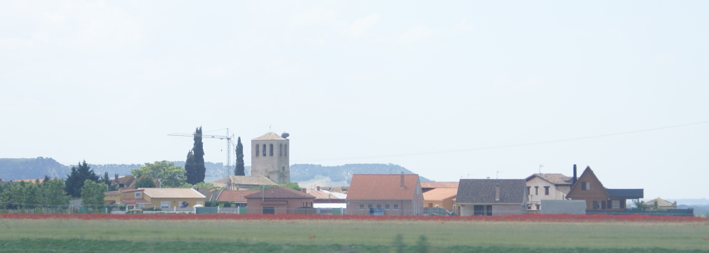 Vista de Aldea de San Miguel.